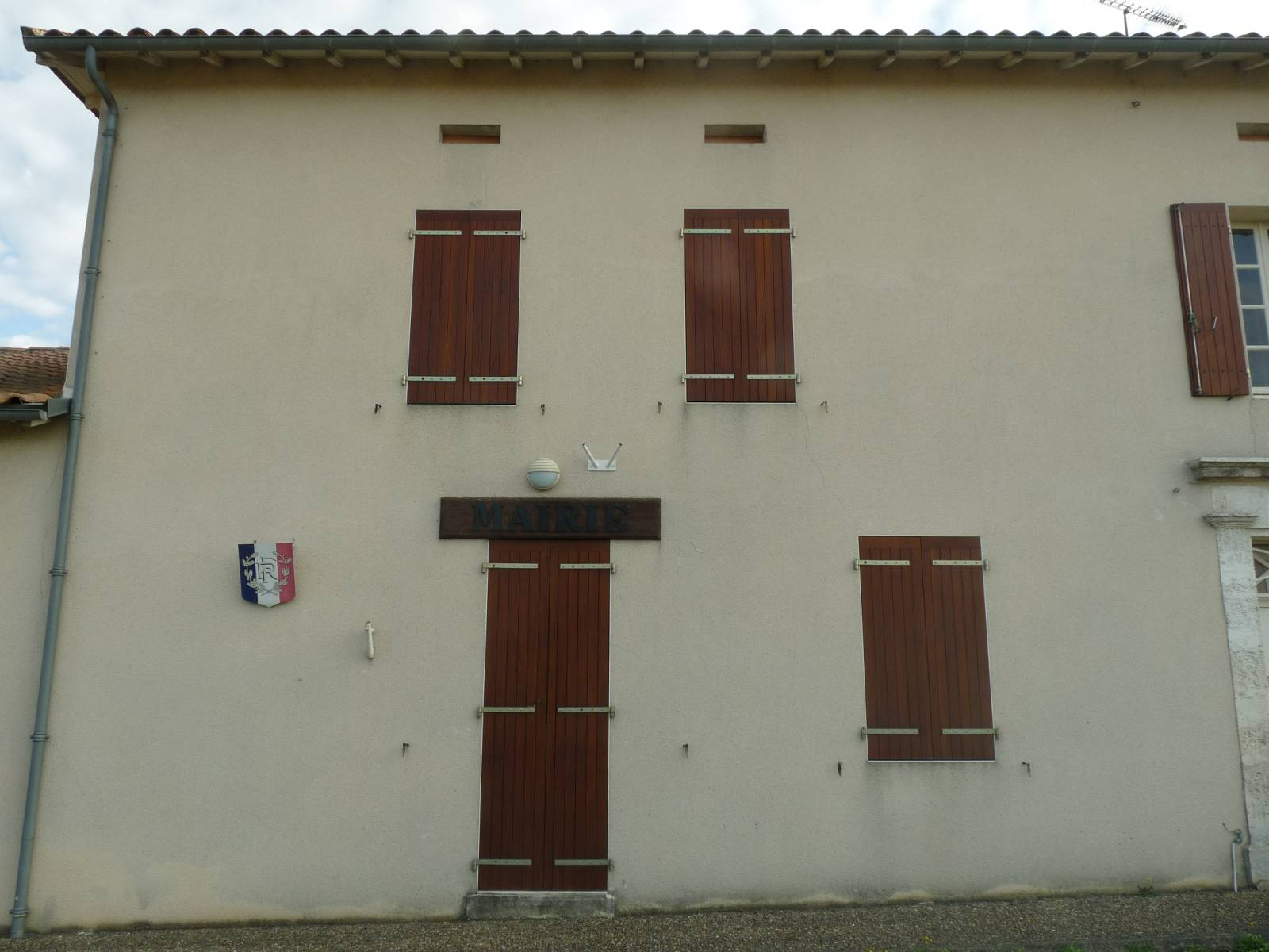 mairie de Nabinaud, Charente, France